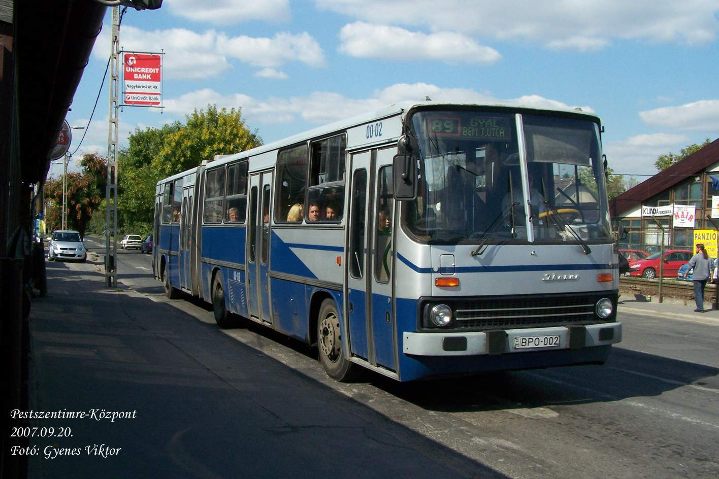 Gyors 89-es jelzésű Ikarus 280-as busz a Nagykőrösi úton